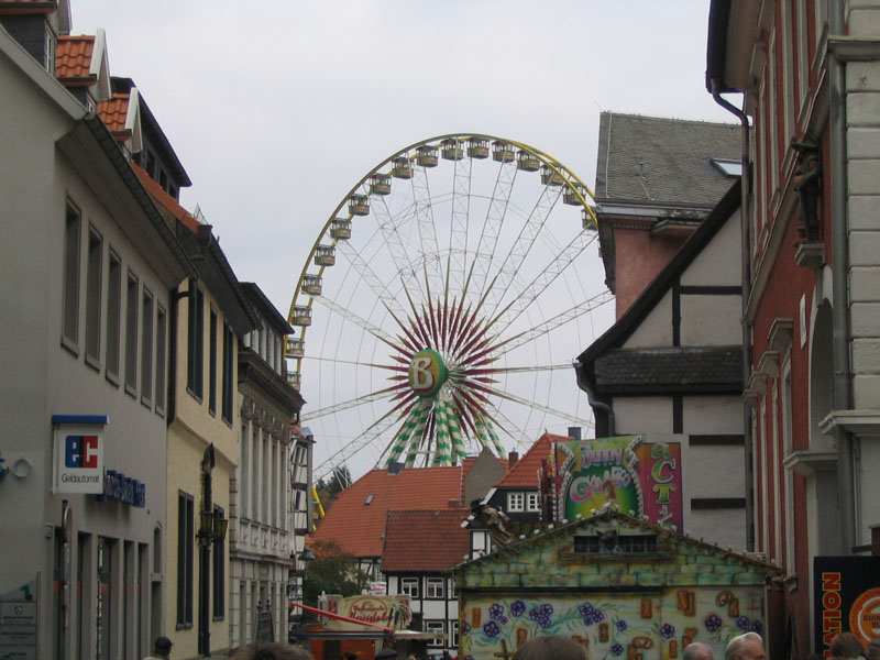 Riesenrad in der Häuserschlucht der Soester Altstadt, Allerheiligenkirmes